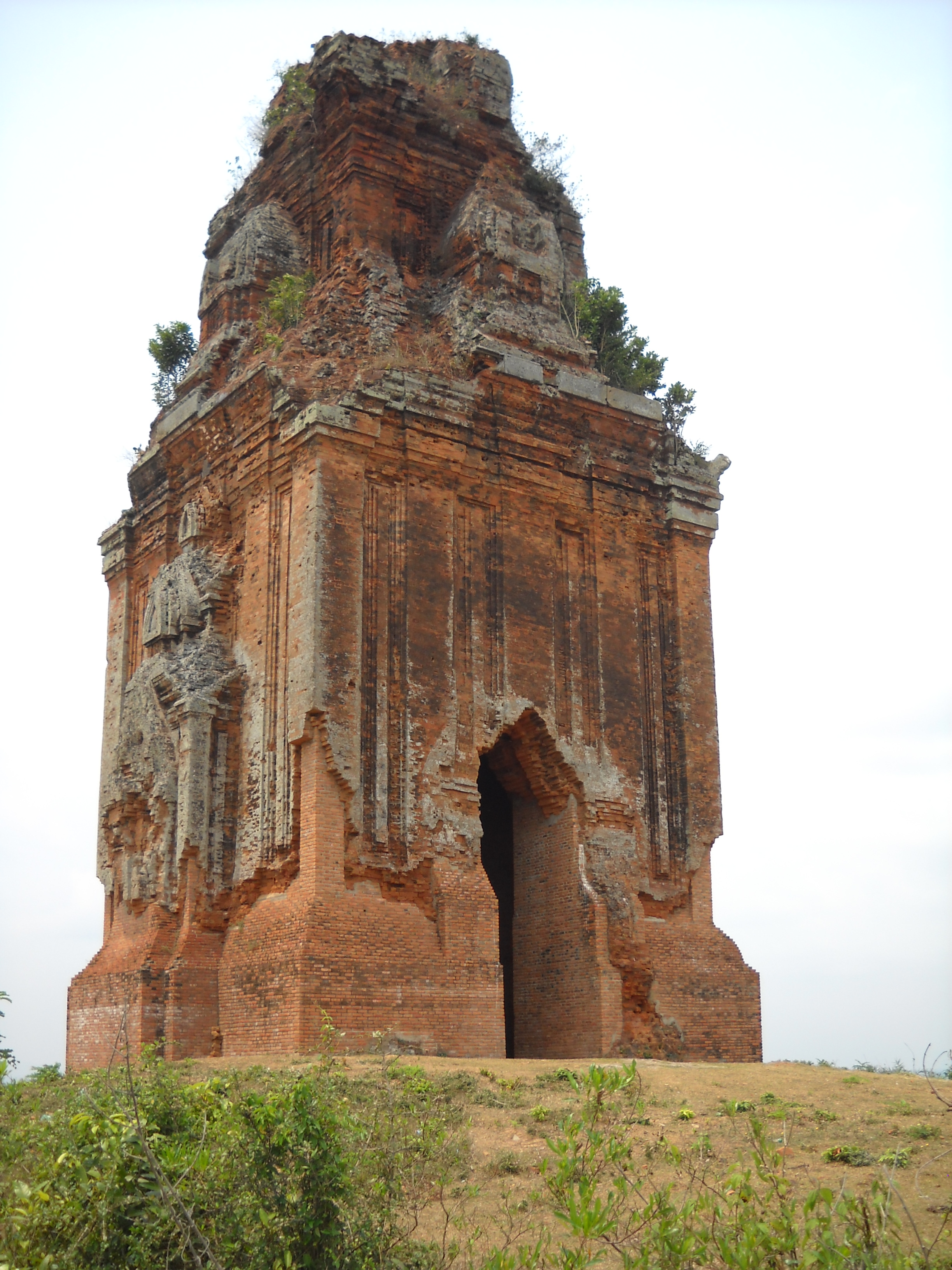 The Cham tower Phu Loc in An Nhon district, Binh Dinh province, Vietnam